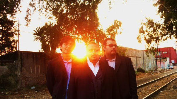 Foto tomada en la sesión para la portada del disco Los Jaigüey